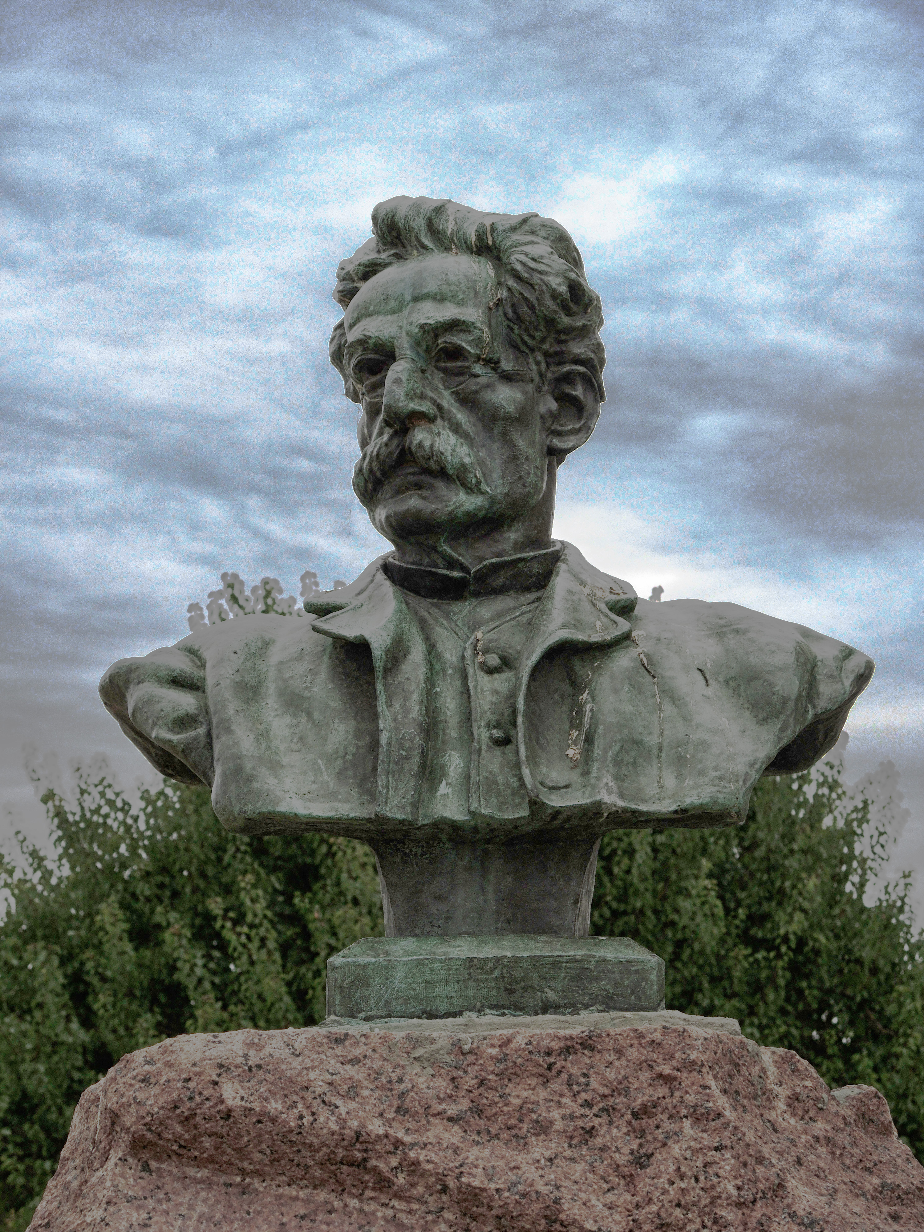 Могила Рафаэла Патканяна (1830 - 1892), поэта и писателя: пос. Мясникован, Ростов-на-Дону, Ростовская область